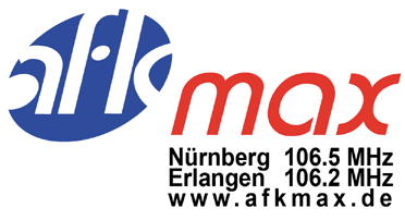 Offizielles Logo des Aus- und Fortbildunskanals MAX (AFK MAX)